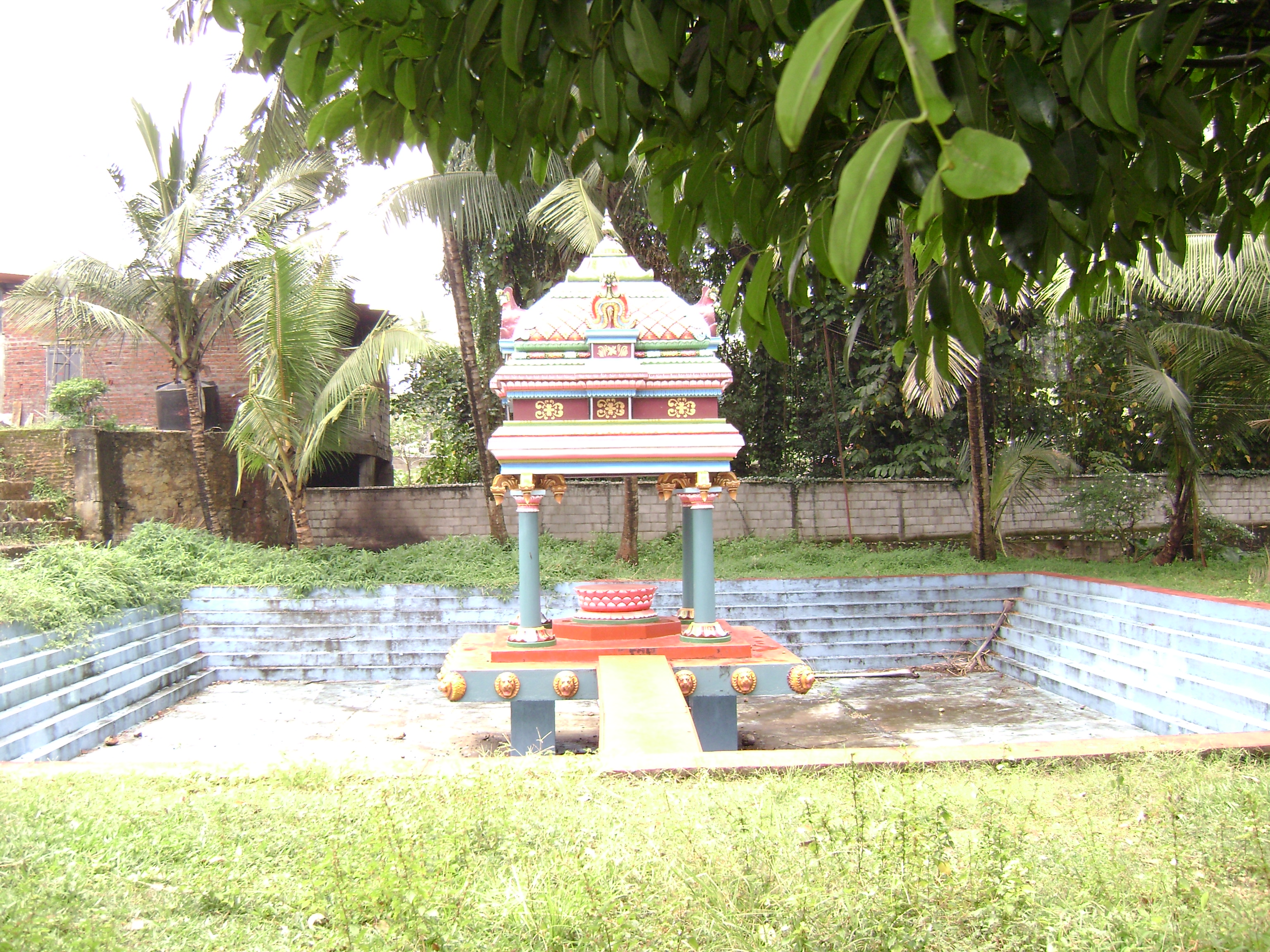 Matale Sri Muttumariyamman Water Tank